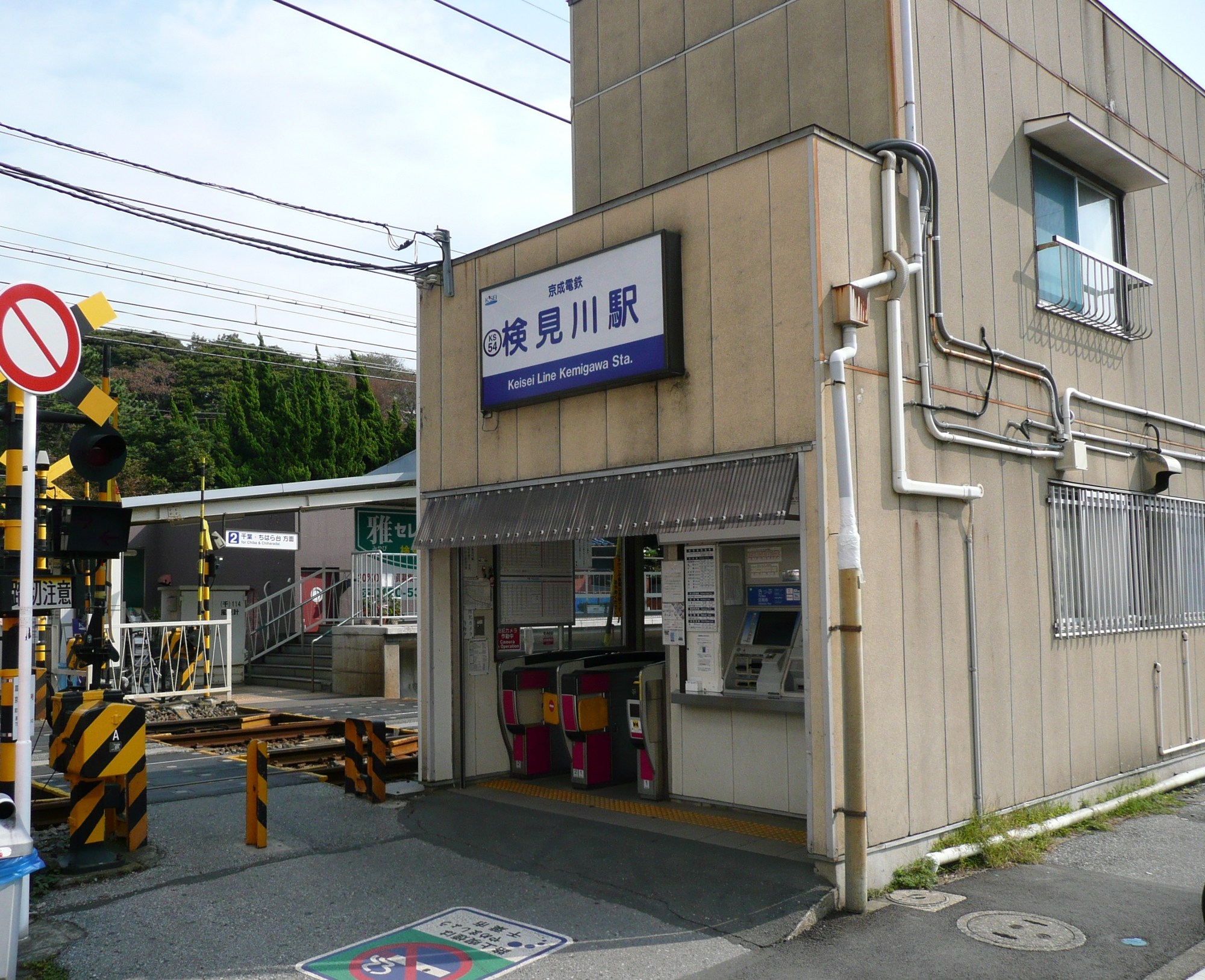 検見川駅駅舎